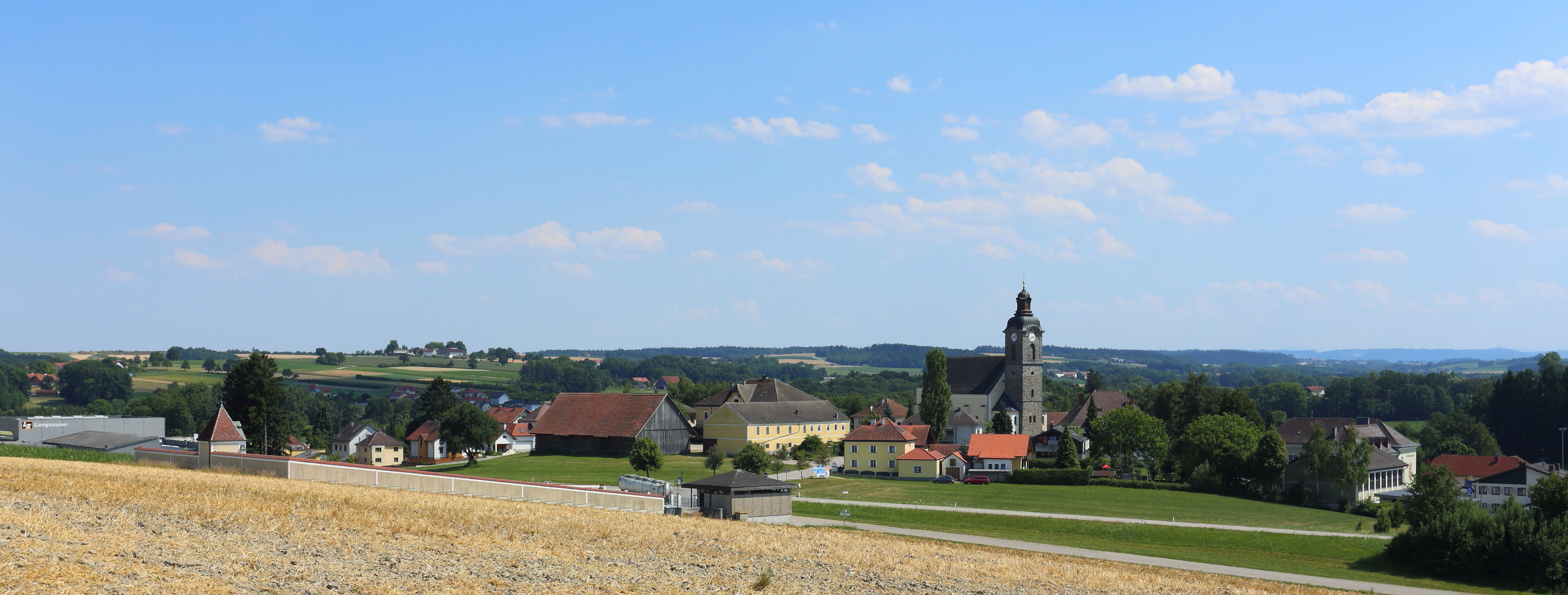 Südansicht der oberösterreichischen Gemeinde Lambrechten.